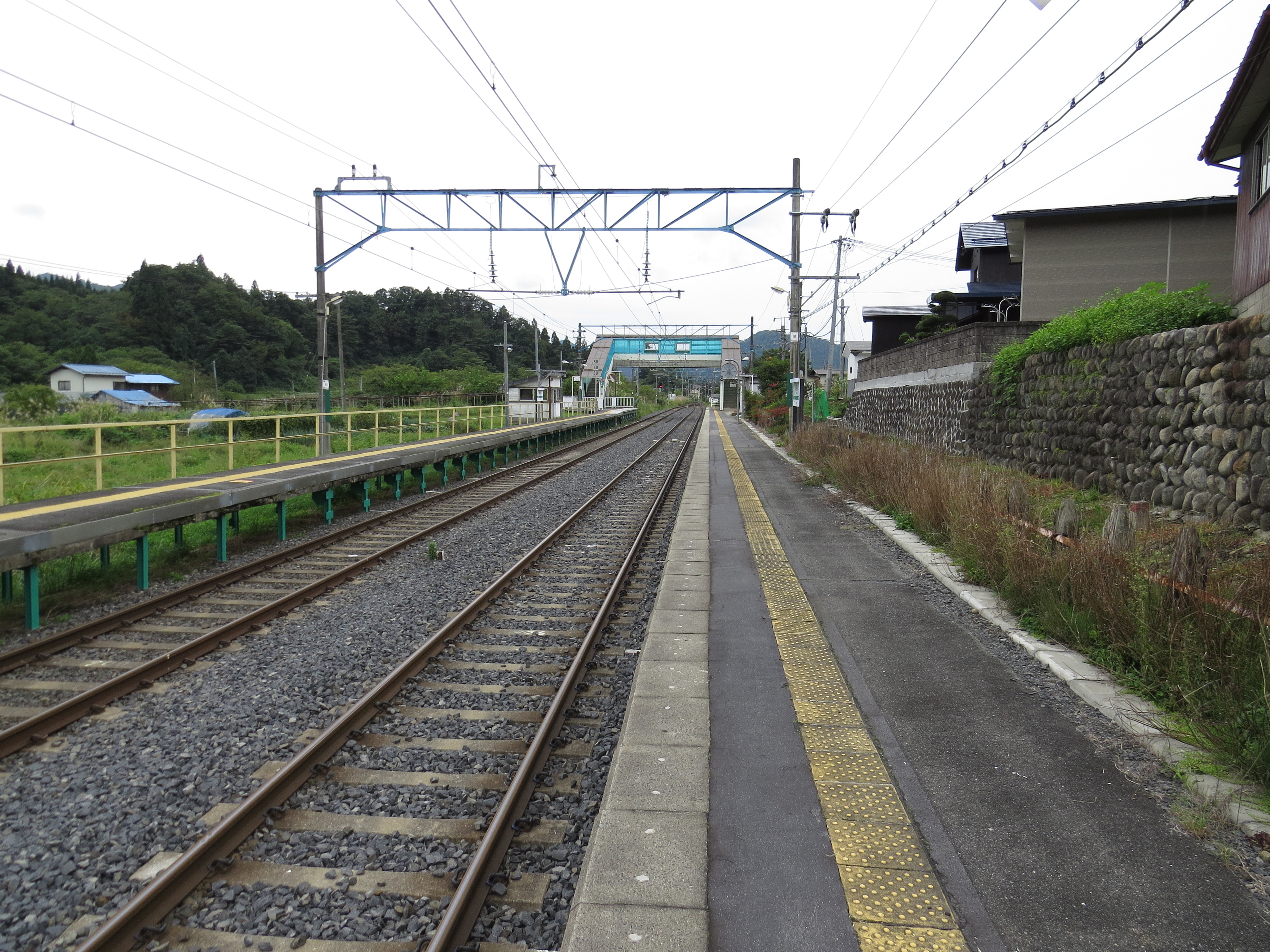 JR東日本 羽前中山駅 駅構内